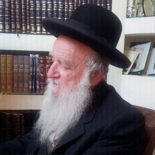 הרב נפתלי צבי גוטליב